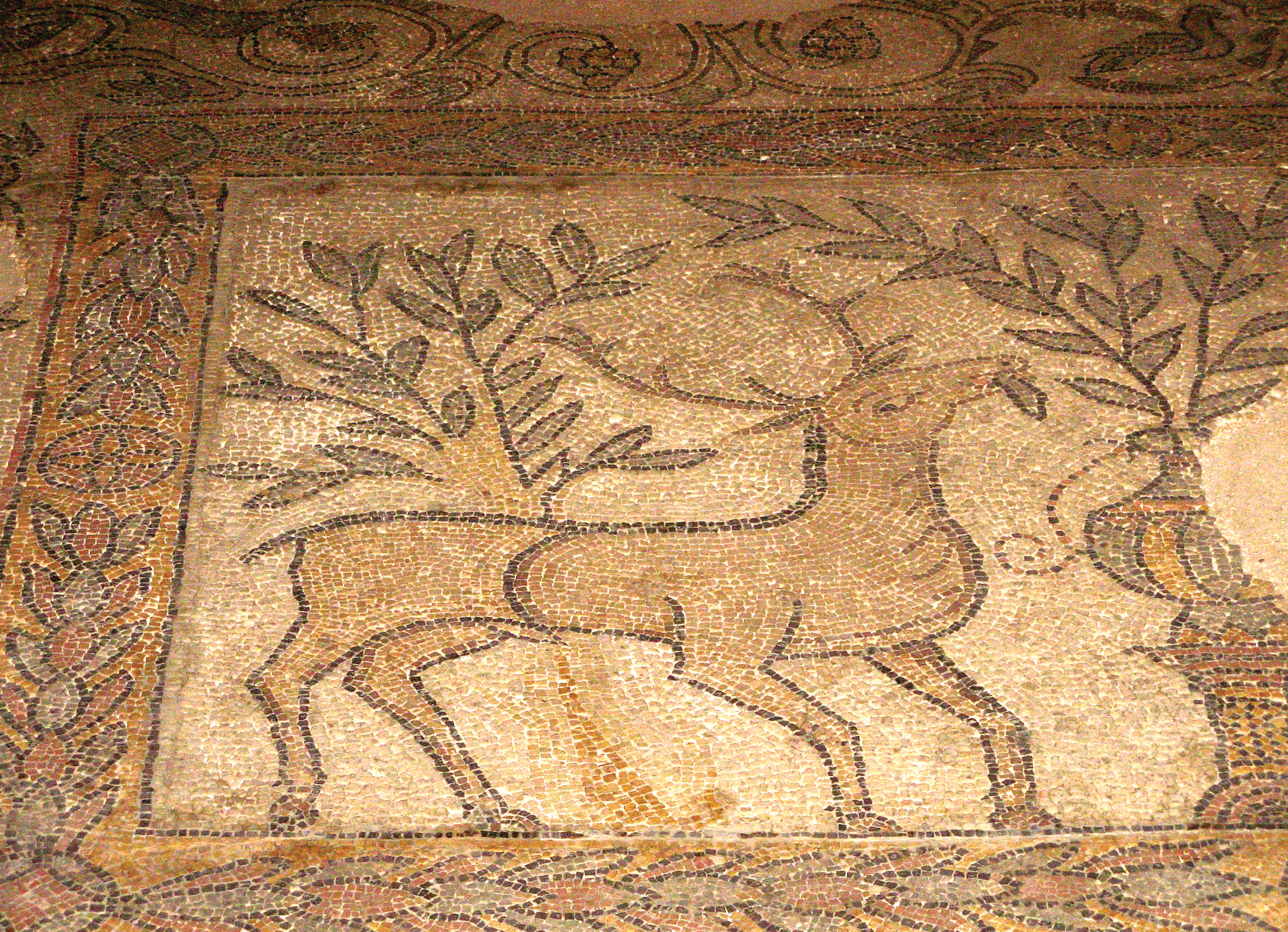 Gallo-Romeins mozaïek in het Museum van de Stad Sens, Yonne, Bourgondië.